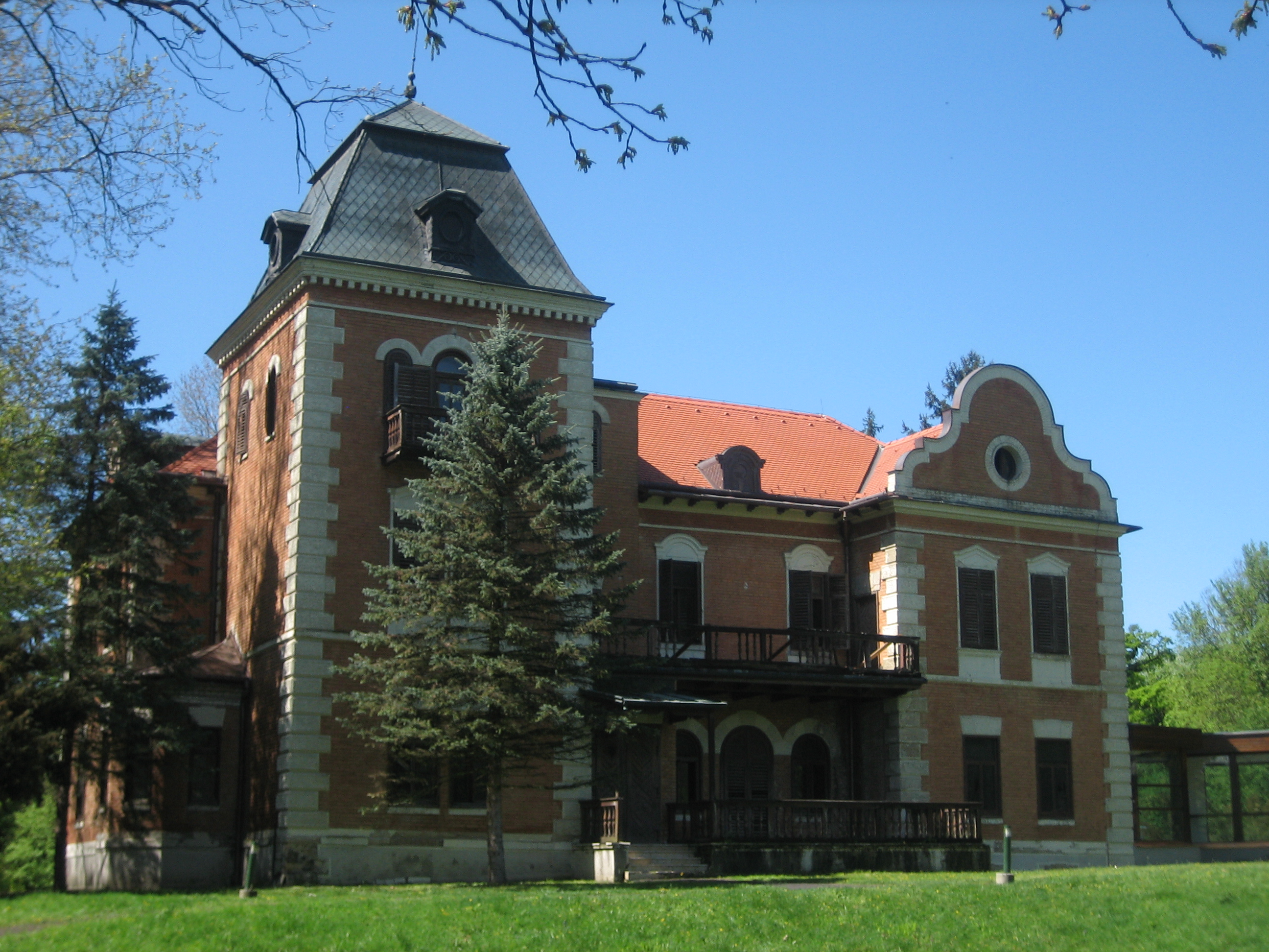 Tikveš Castle in Baranja, Croatia (early 20th cent.) / Dvorac Tikveš u Baranji (početak 20. st.)